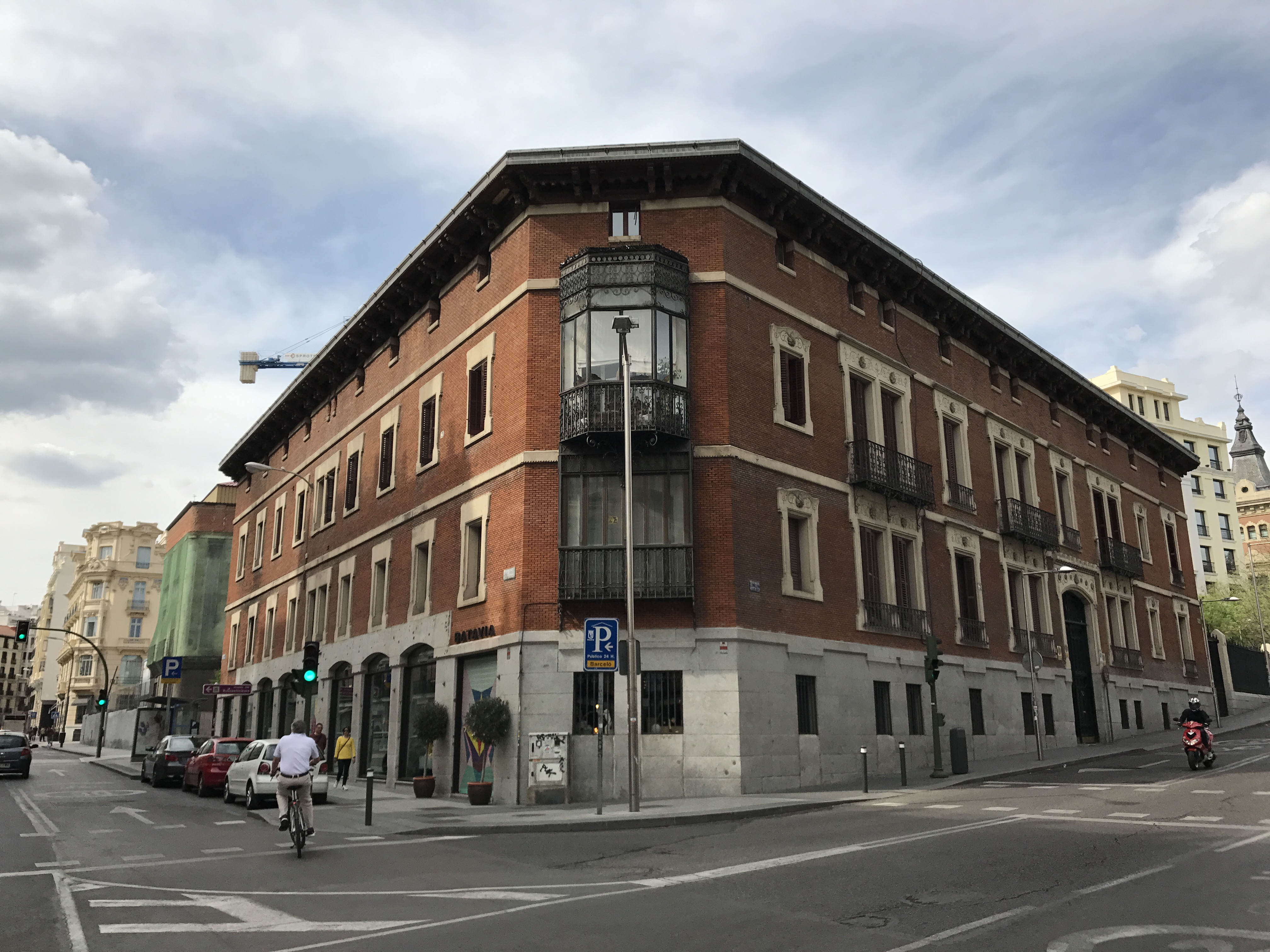 Palacio del conde de Villagonzalo